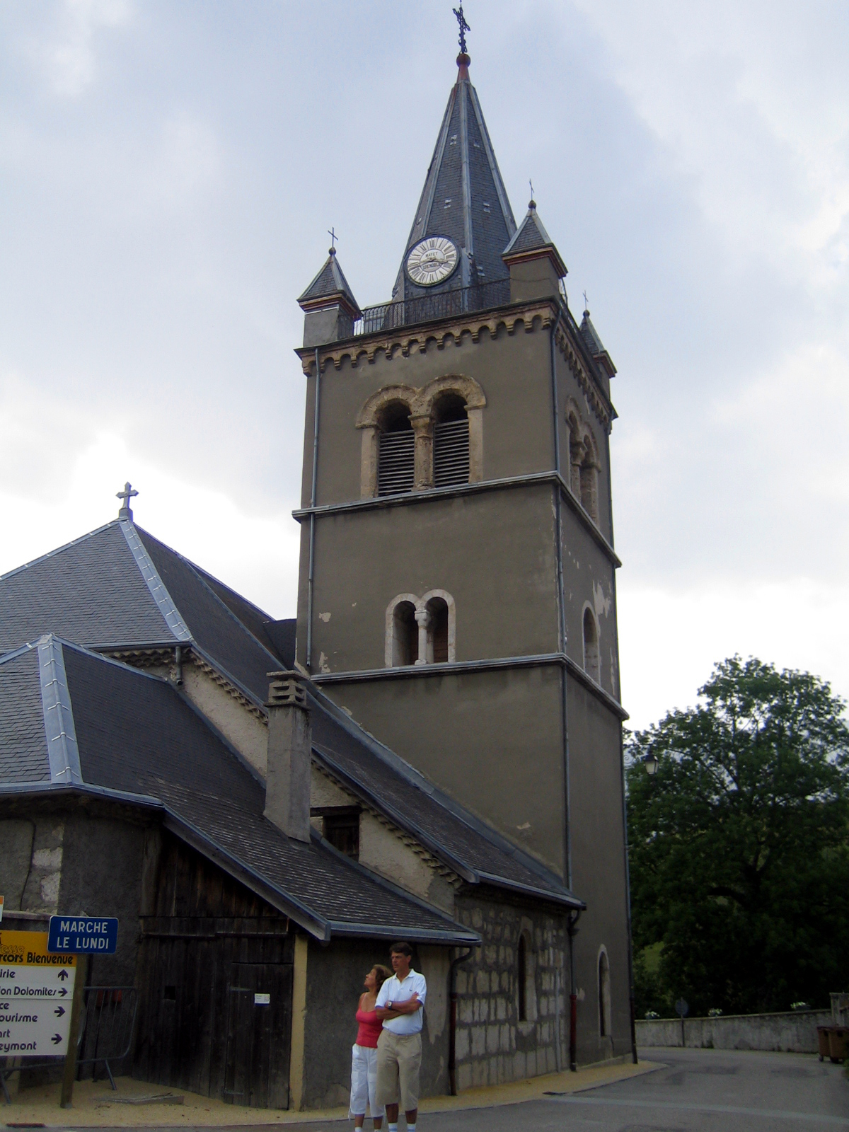 Gresse-en-Vercors (Isère, France) - L'église. .